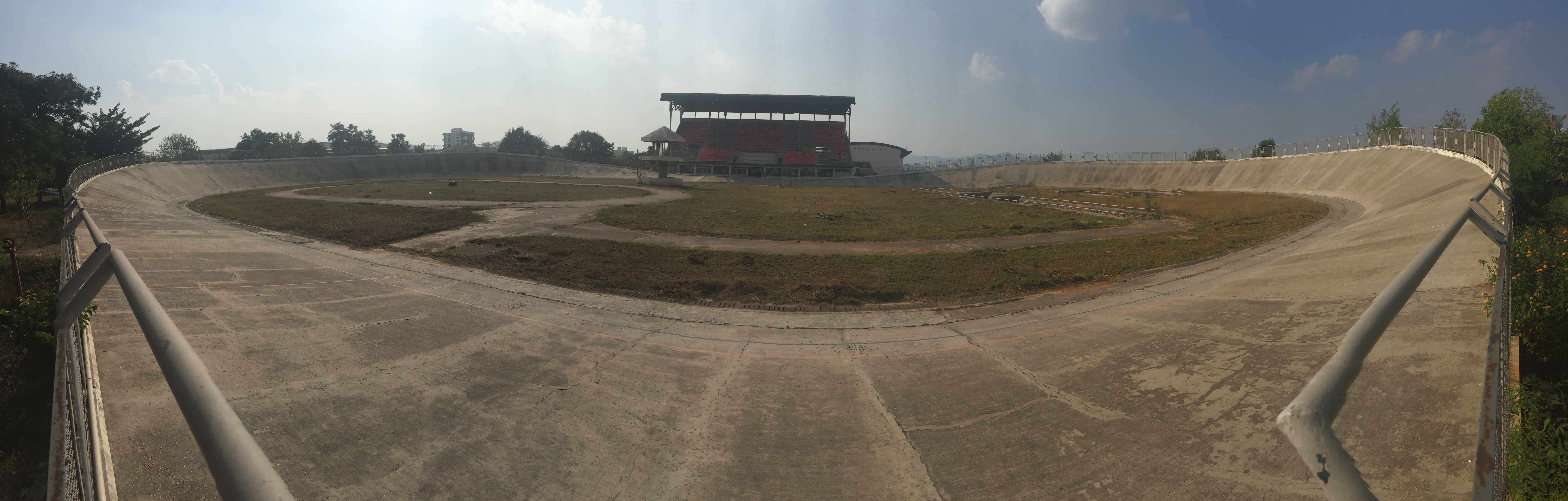 Shree Shiv Chhatrapati Sports Complex velodrome